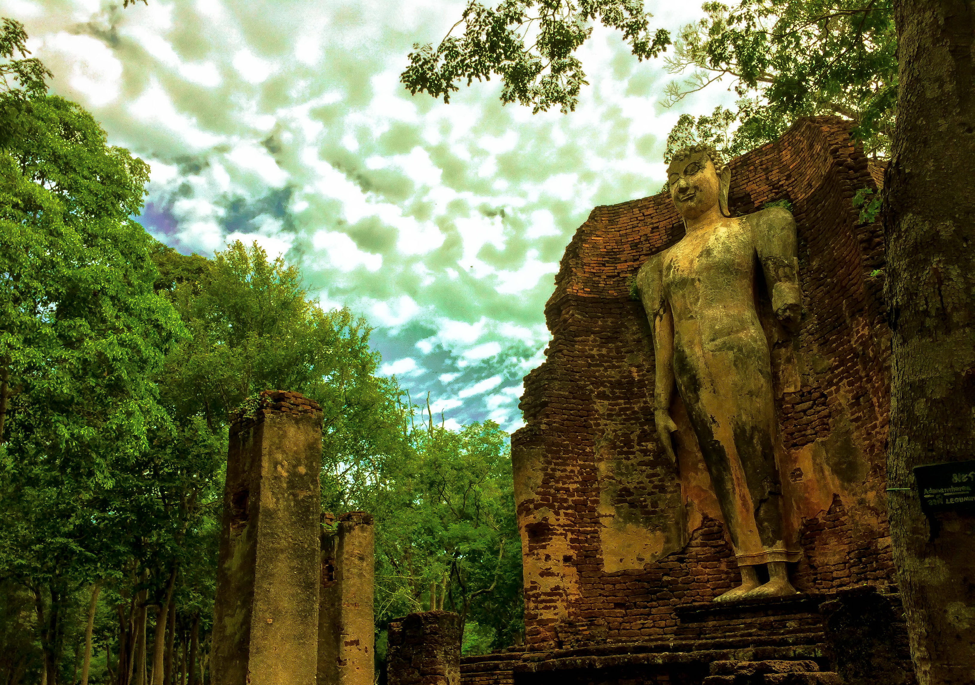 วัดพระสี่อิริยาบถ รหัสโบราณสถาน 0003926